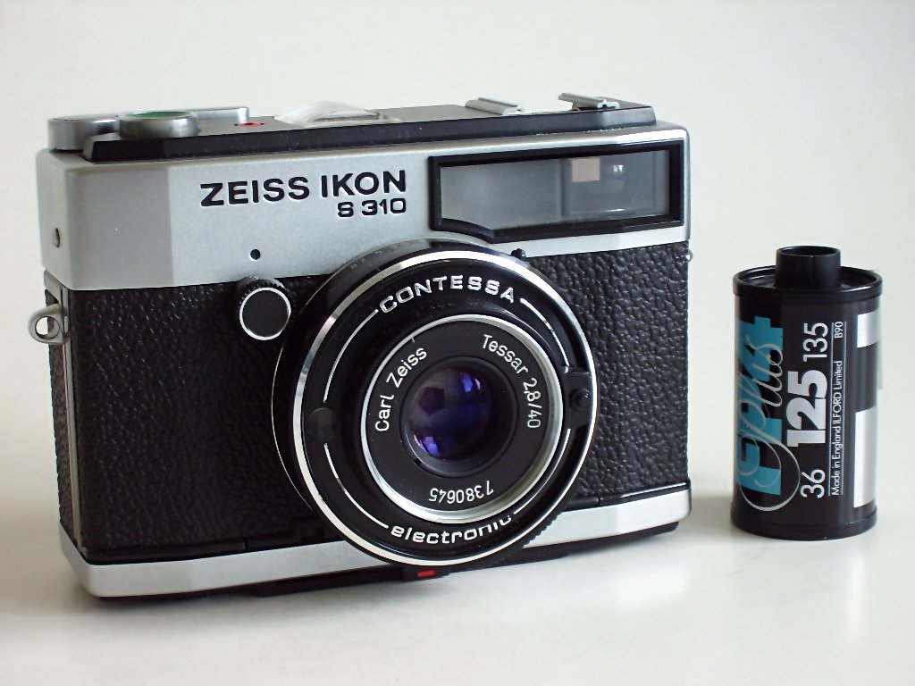 Zeiss Ikon Contessa S310. Compact camera for 135 film made by Zeiss Ikon in the former Voigtländer Werk in Braunschweig, Germany